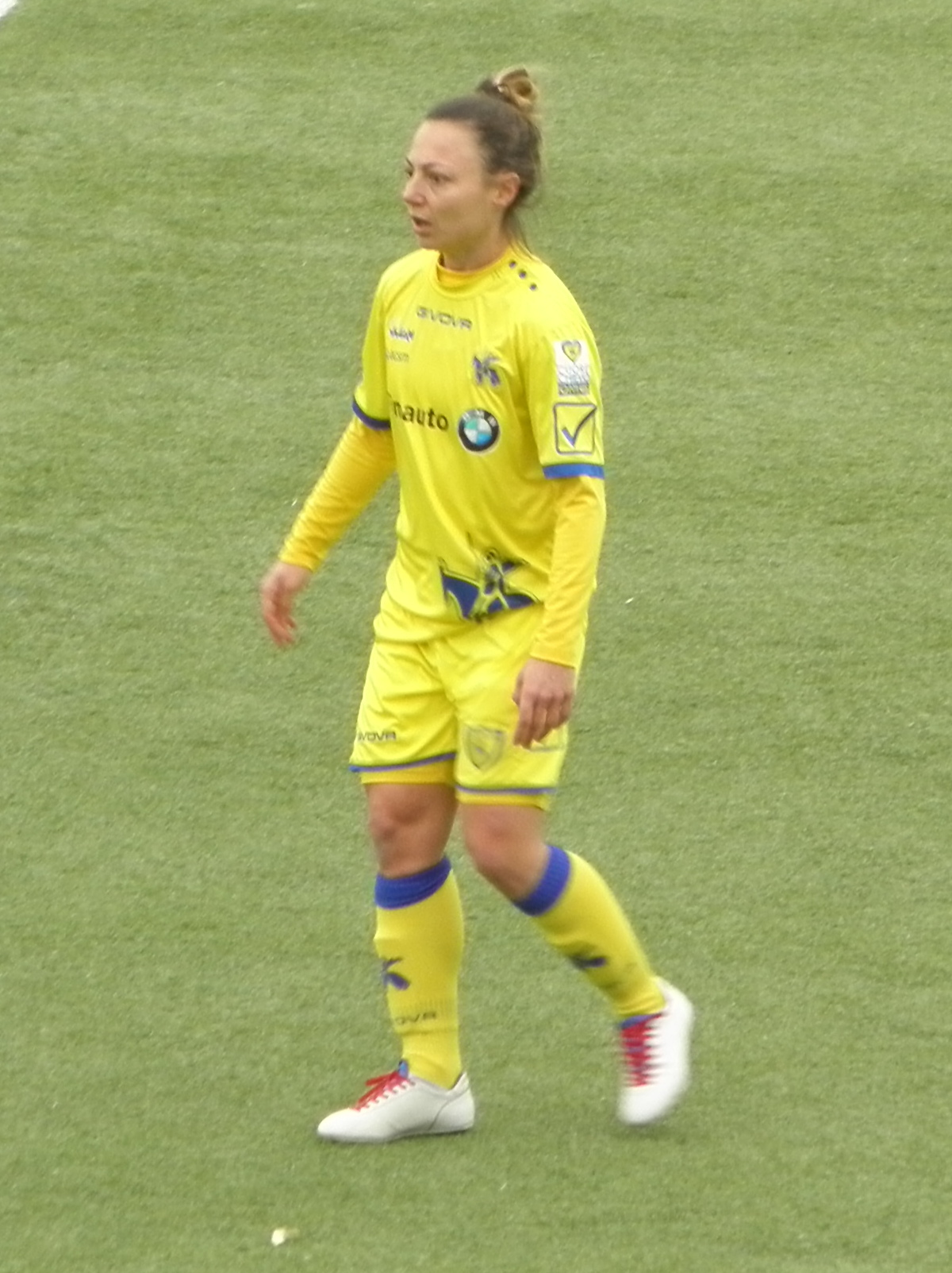 Verona, Stadio Aldo Olivieri: Silvia Fuselli in Fimauto Valpolicella - AGSM Verona del 17 febbraio 2018.